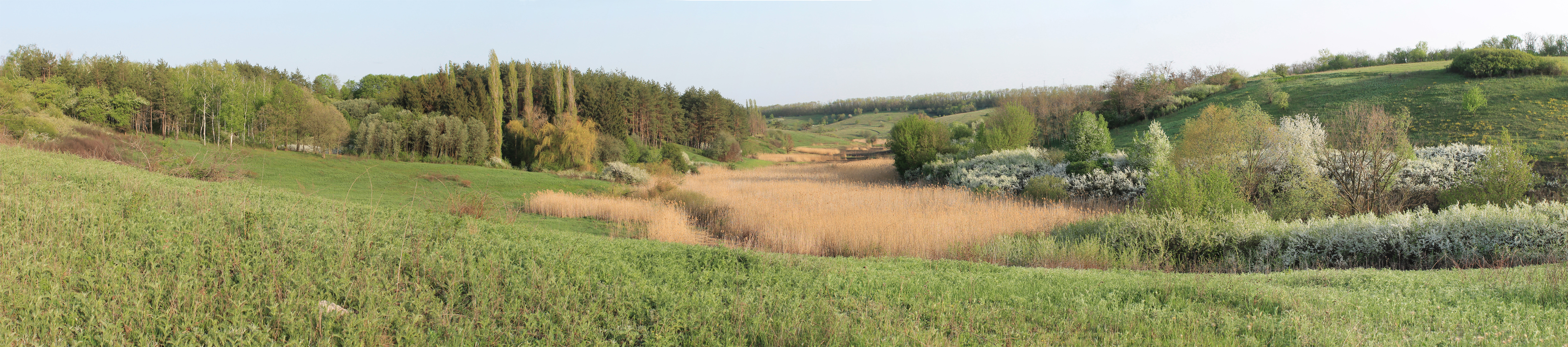 Ботанічний заказник «Рязанова балка», ДП НДГ «Докучаєвське» Харківського національного аграрного університету ім. В. В. Докучаєва, с.Рогань, Харківський р-н.